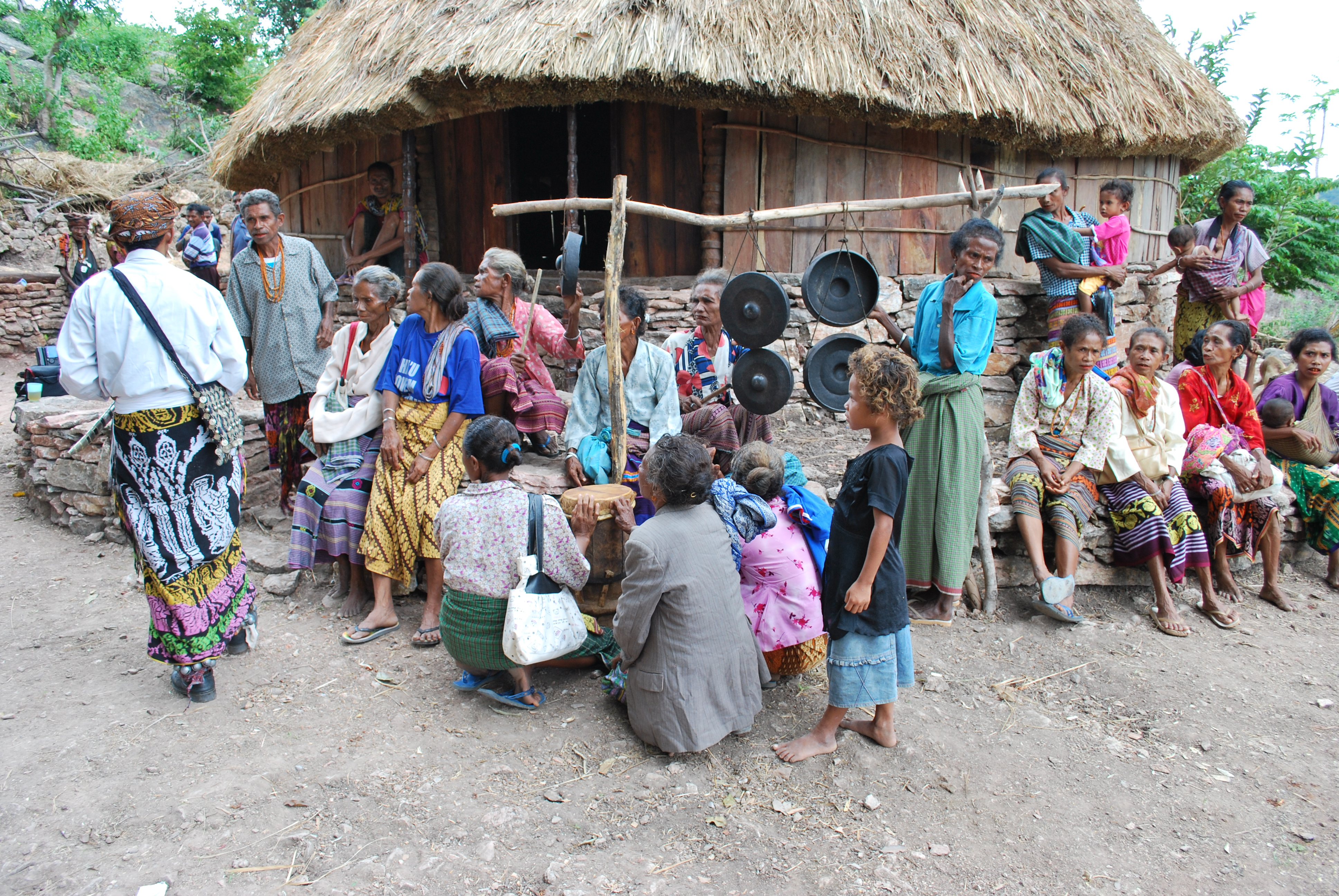 Tumin, Oessilo, Oecusse